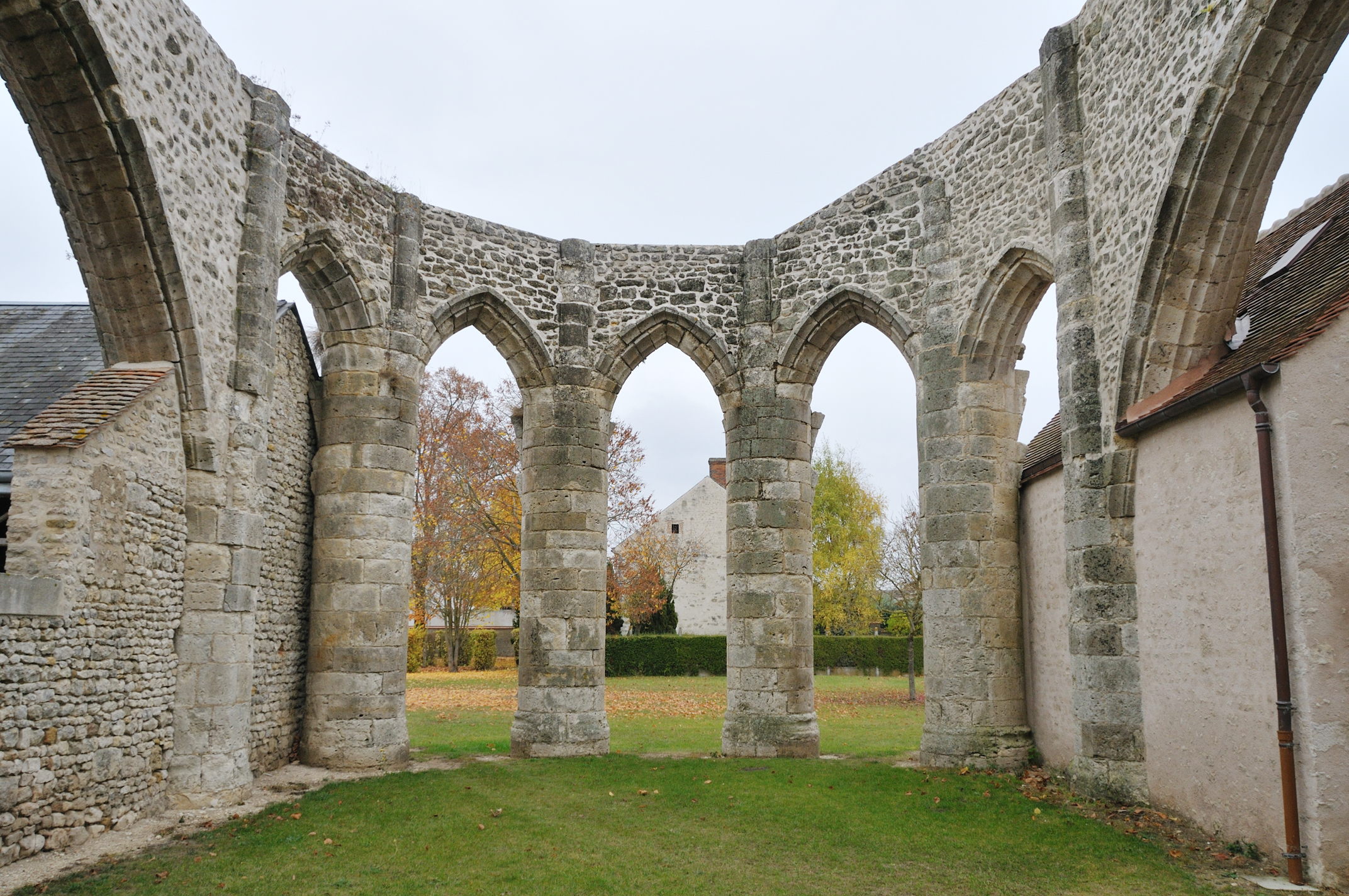 Chœur inachevé de l'église Saint-Jacques-le-Majeur, Courcelles, Loiret, France